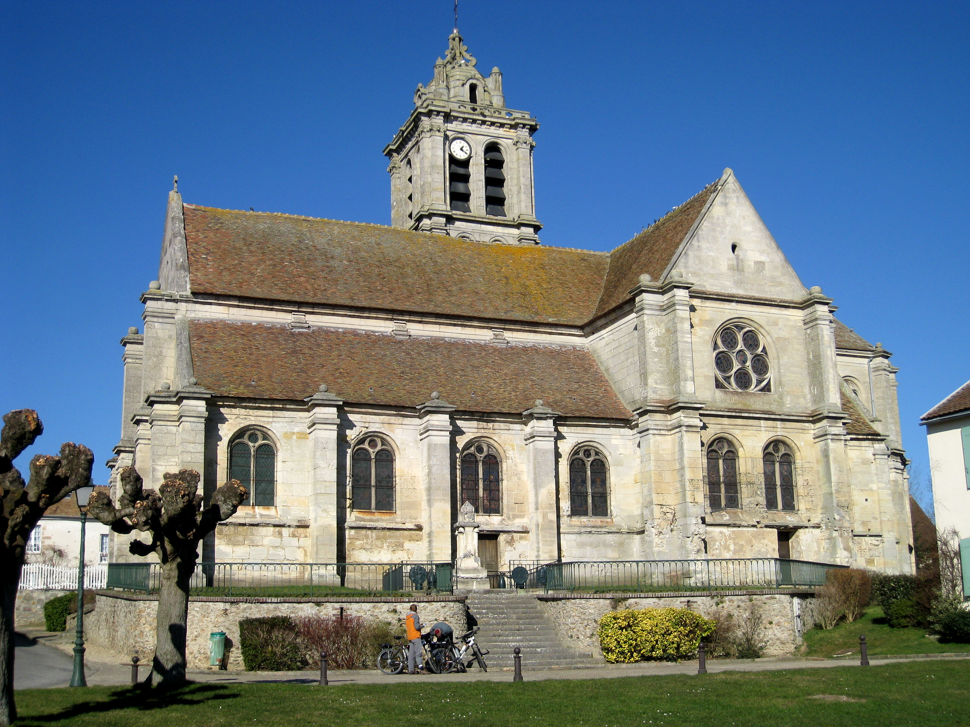 Façade sud de l'église d'Epiais-Rhus, Val d'Oise, France